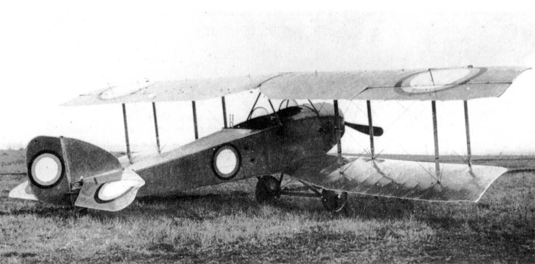 Samolot Antra Anade